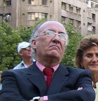 Diputado Democracia Cristiana